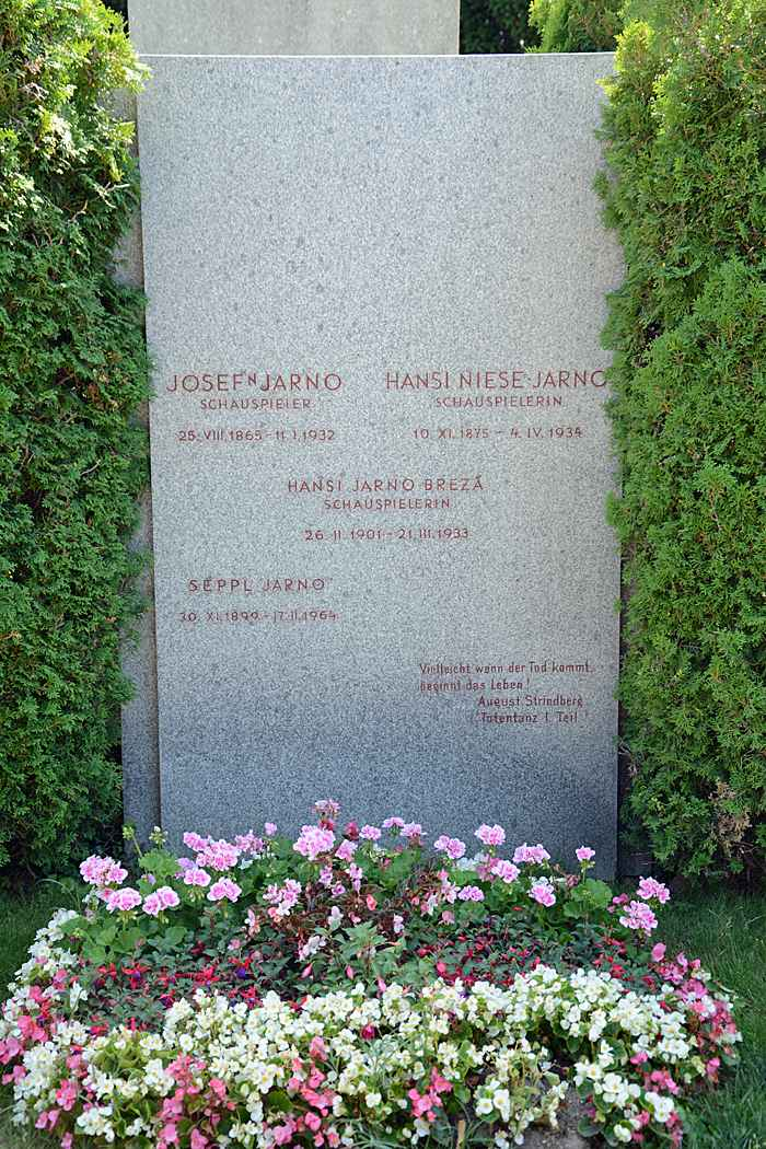 Grab von Josef Jarno und Hansi Niese auf dem Zentralfriedhof Wien